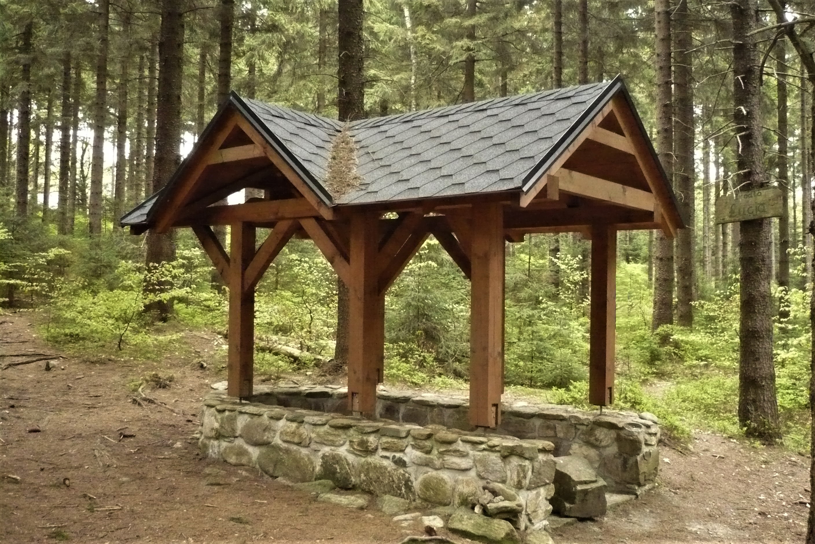 Źródło Łucji